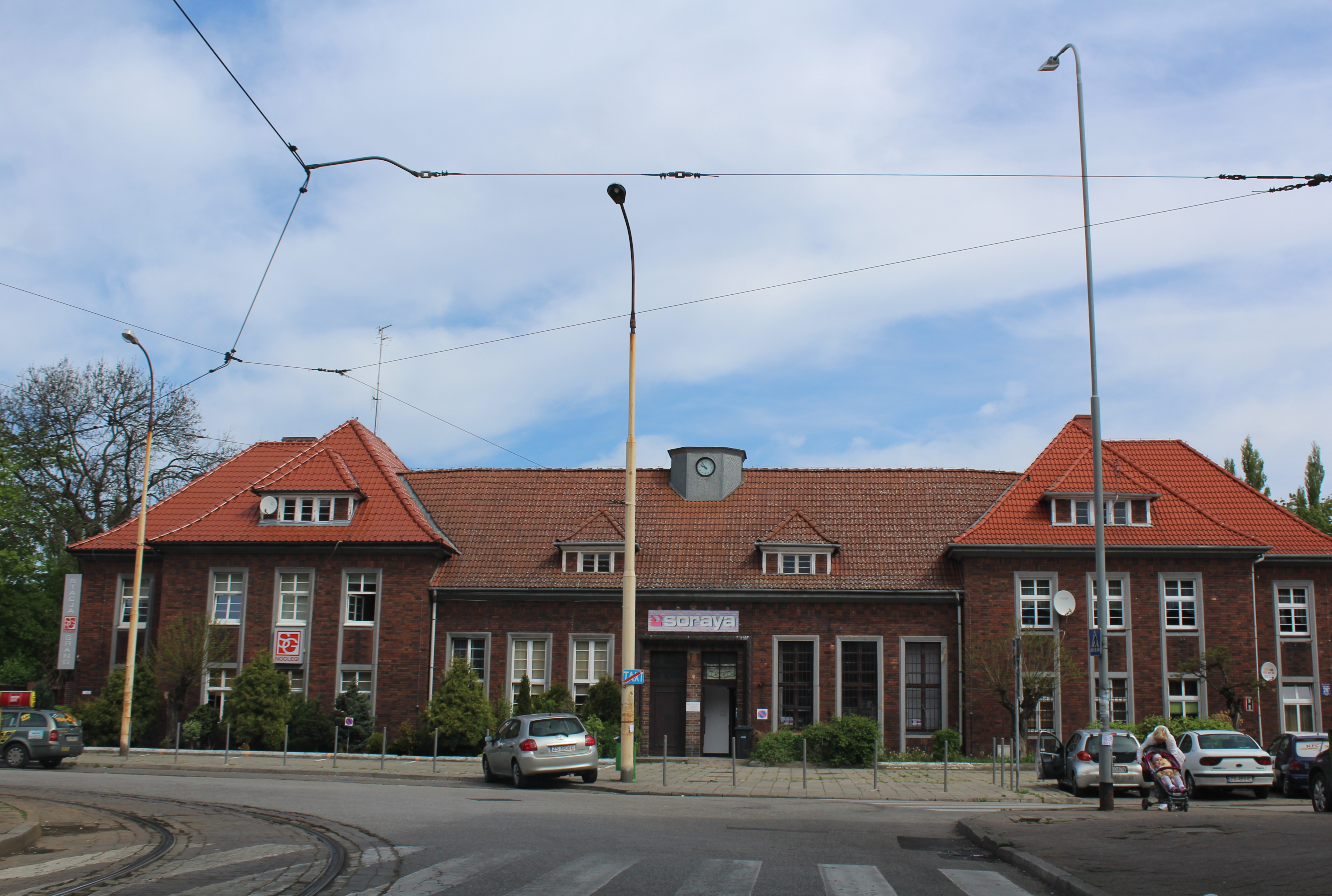 Dworzec kolejowy Szczecin Niebuszewo.